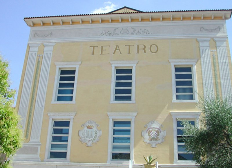 Teatro Alberti in Desenzano del Garda Source: photo uploaded by User:RicciSpeziari. Photographer: Riccardo Speziari